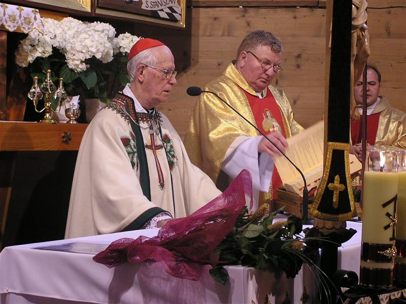 Kard. Stanisław Nagy podczas uroczystości udzielania Sakramentu Bierzmowania w podgórskiej parafii. Zdjęcie zrobione 2 kwietnia 2005 roku.